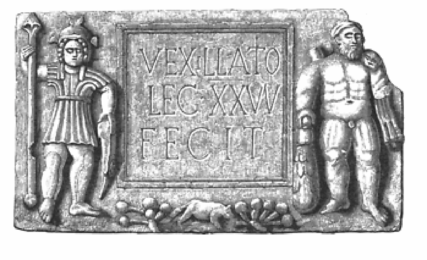 Bauinschrift der Legio XX, vom Osttor des Kastells Bremenium, High Rochester, England.